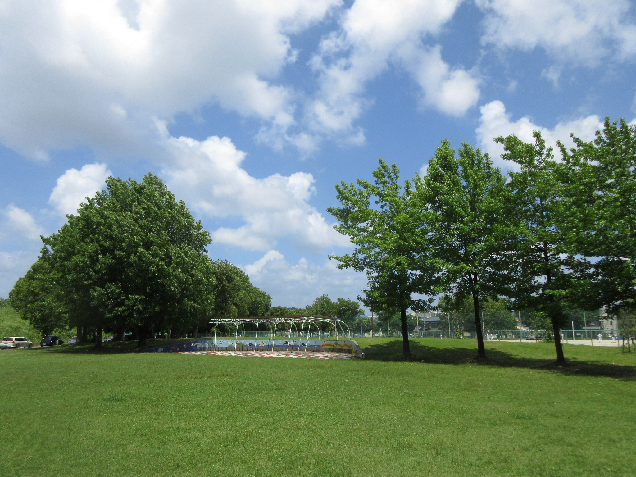 堤下公園（岡崎市上里）